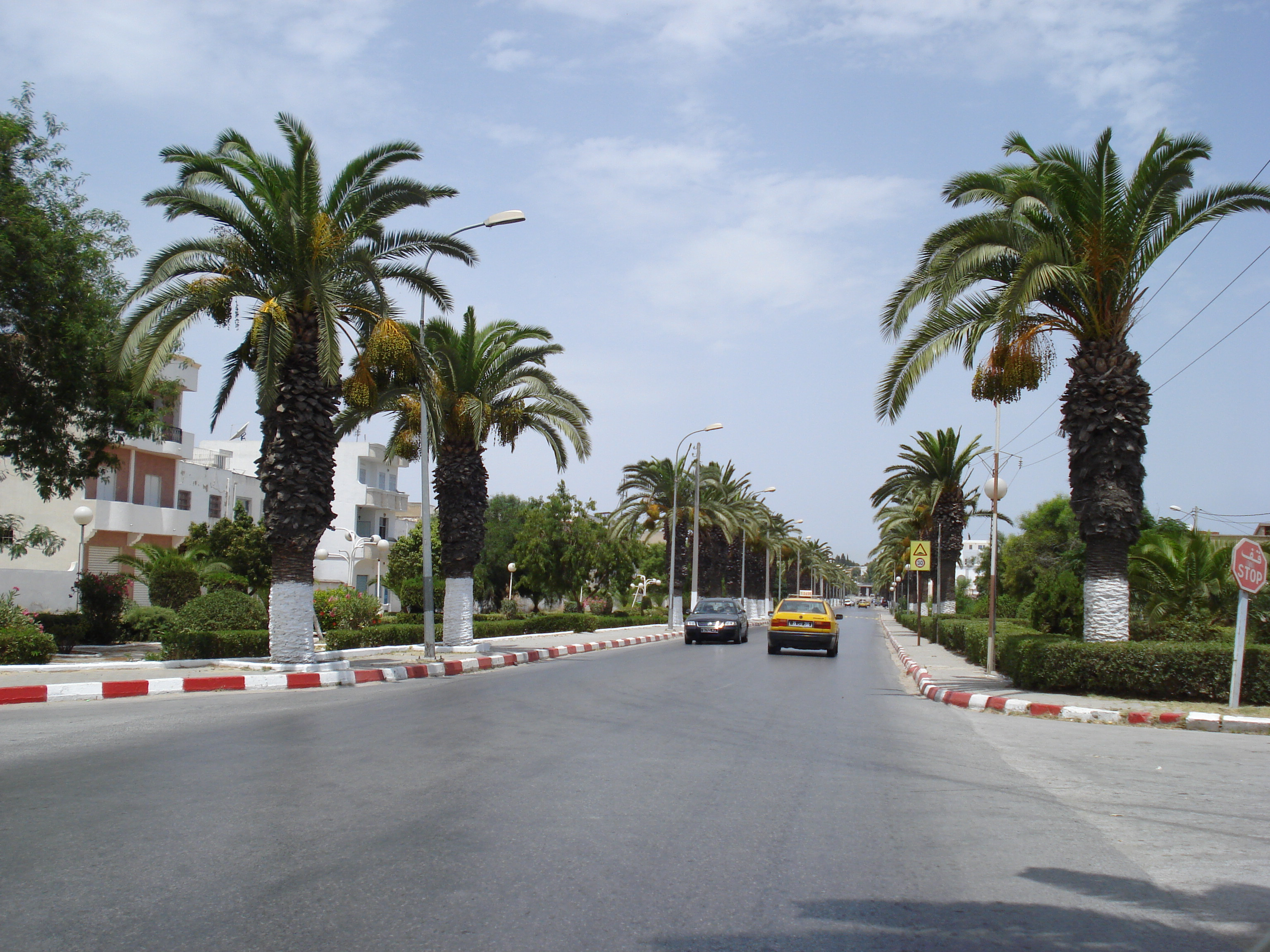 Sidi Rzig, Ben Arous, Tunisie.